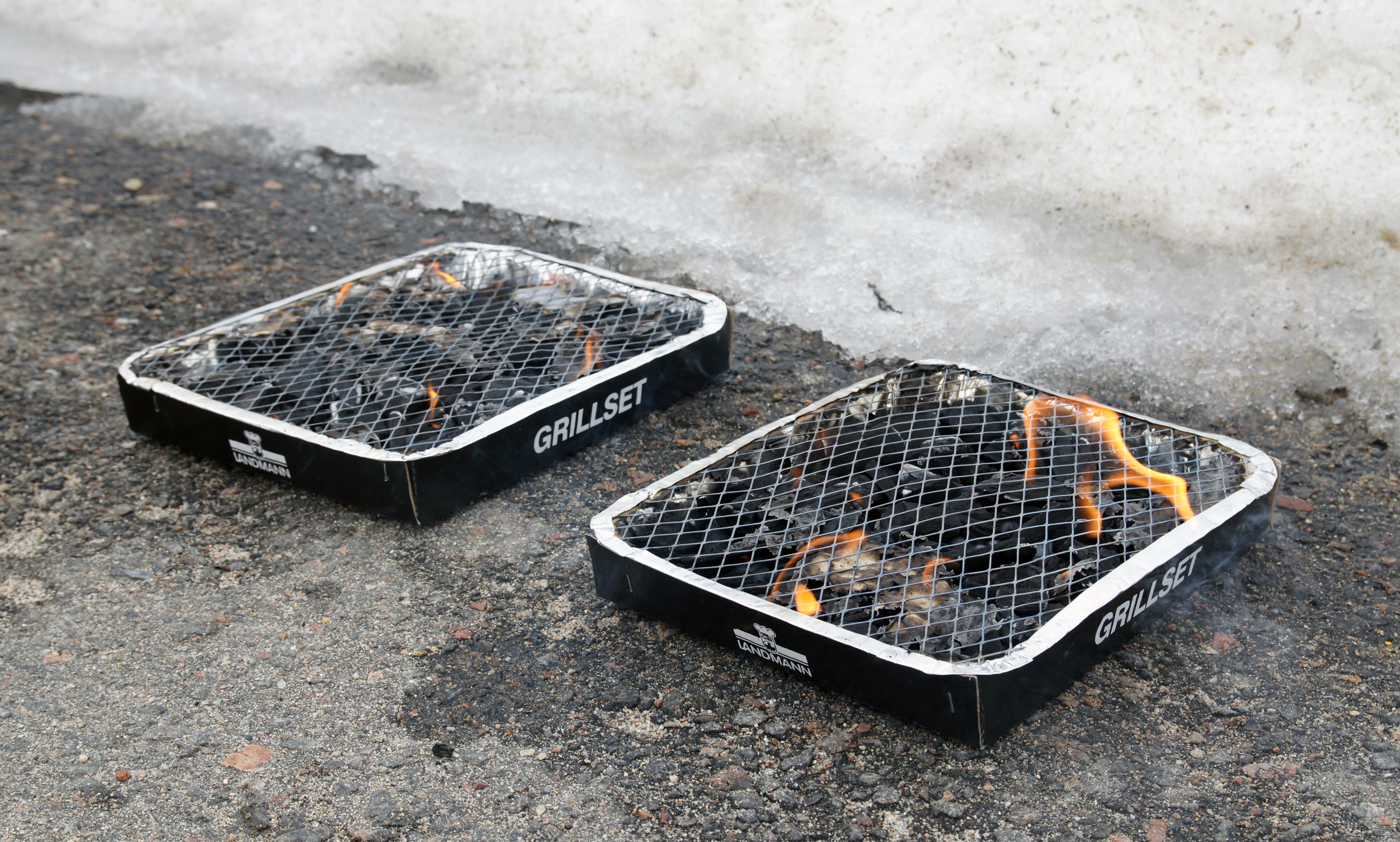 Kaksi kertakäyttögrilliä.